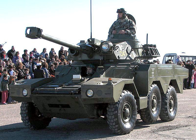 ERC-90 de la Infanteria de Marina Argentina